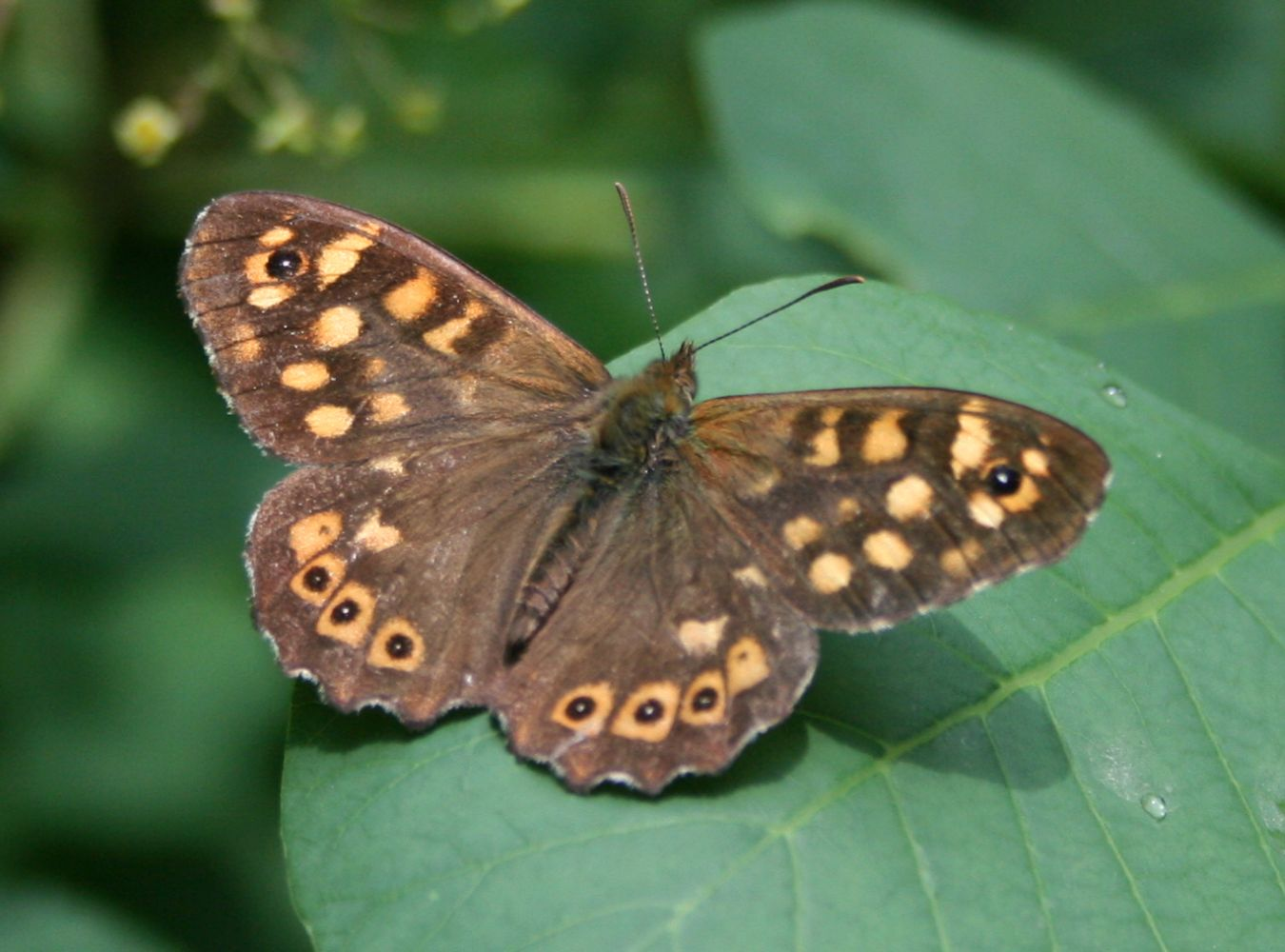 Waldbrettspiel (Pararge aegeria), Edelfalter (Nymphalidae) - Italien/Italia/Italy: Friuli-Venezia Giulia, Prov. Trieste, Rilkeweg/Sentiero Rilke von Sistiana nach Duino